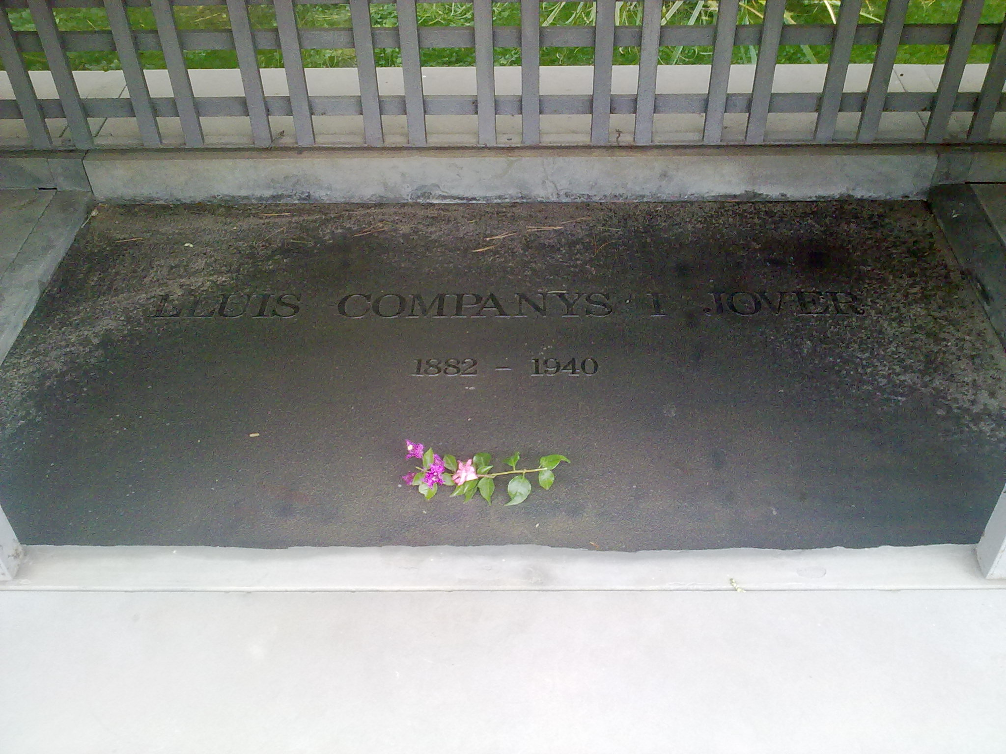 Tomba del president Lluís Companys